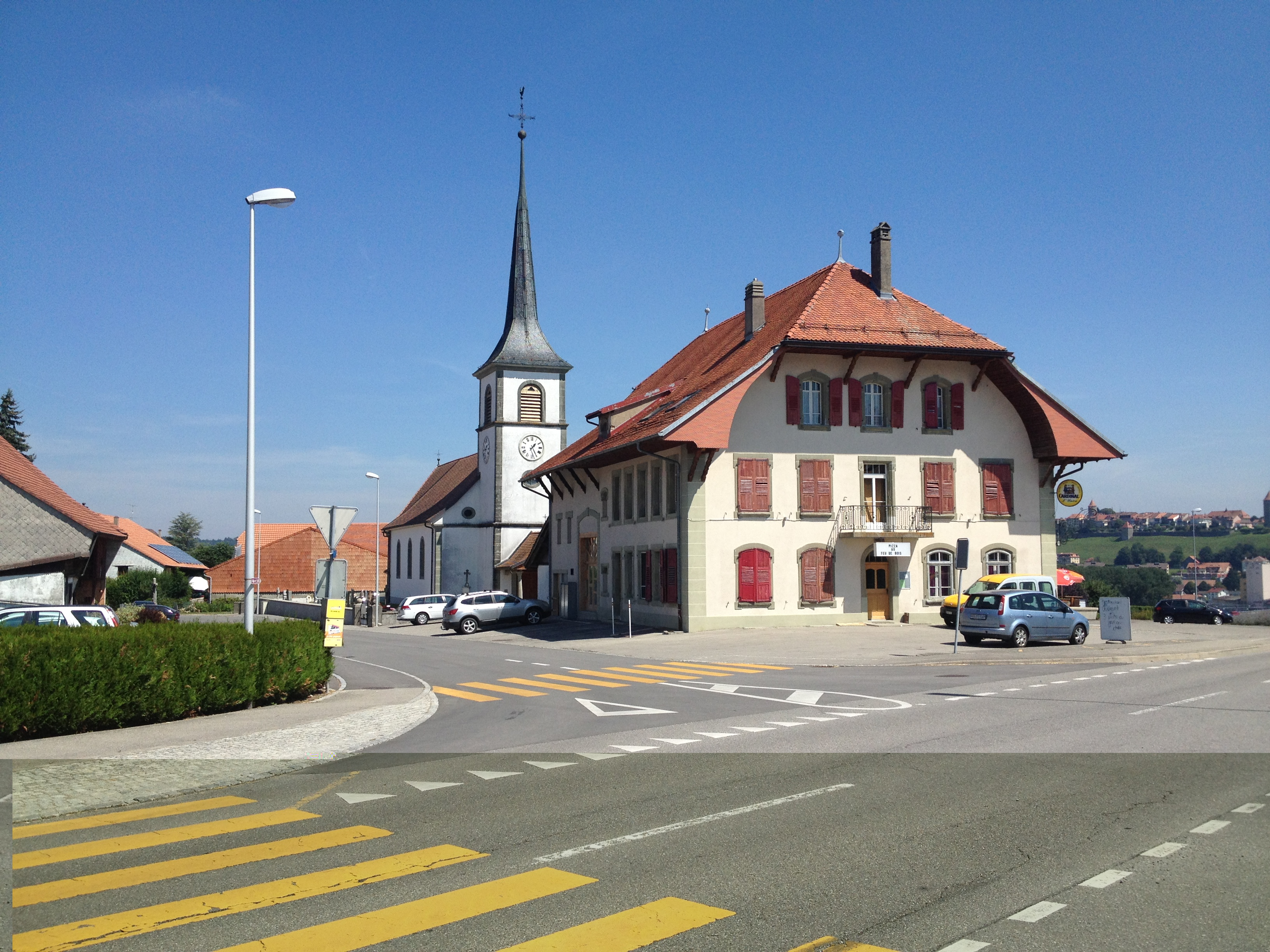 Billens dans la commune fribourgeoise de Billens-Hennens en Suisse.